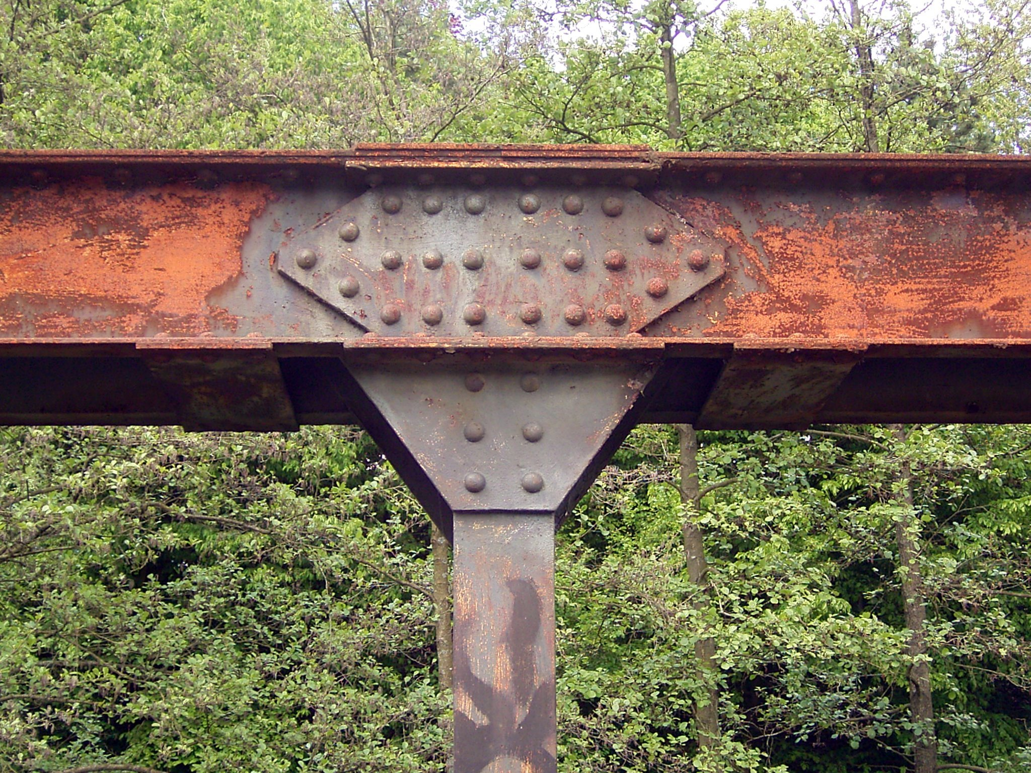 Eisenbahnbrücke Ohler Wiesen über die Wupper in Wipperfürth